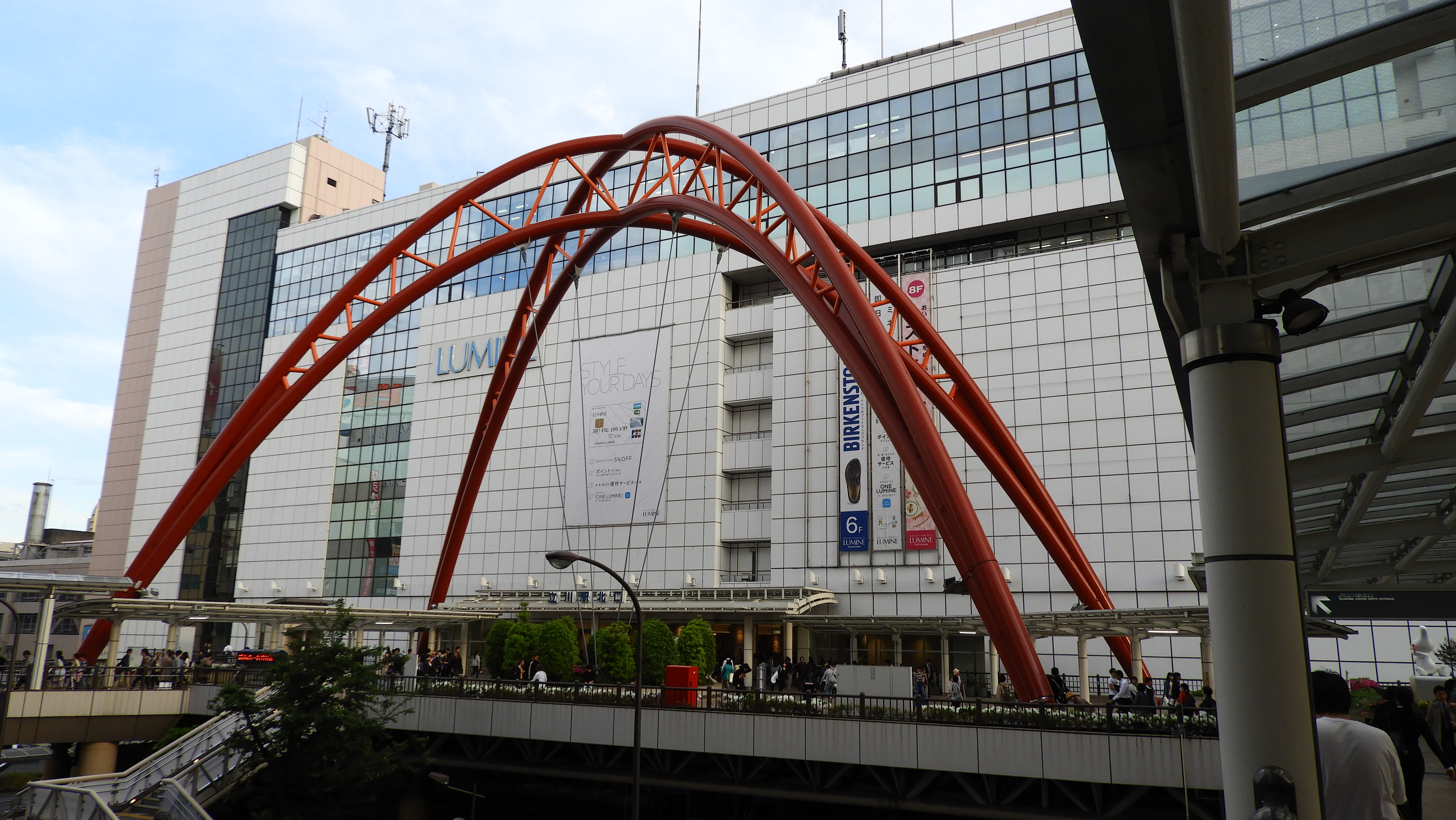 立川駅北口をペデストリアンデッキから望む。